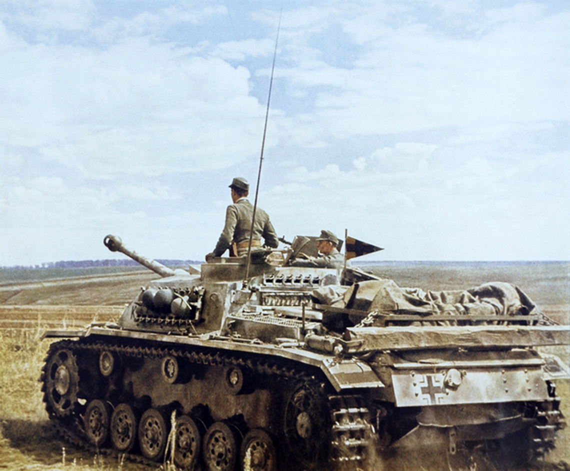 A German Sturmgeschütz III Ausf. F or G assault gun in Russia.